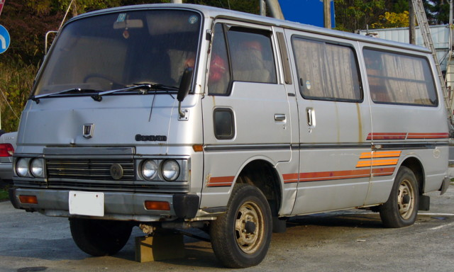 日産・キャラバン（2代目）